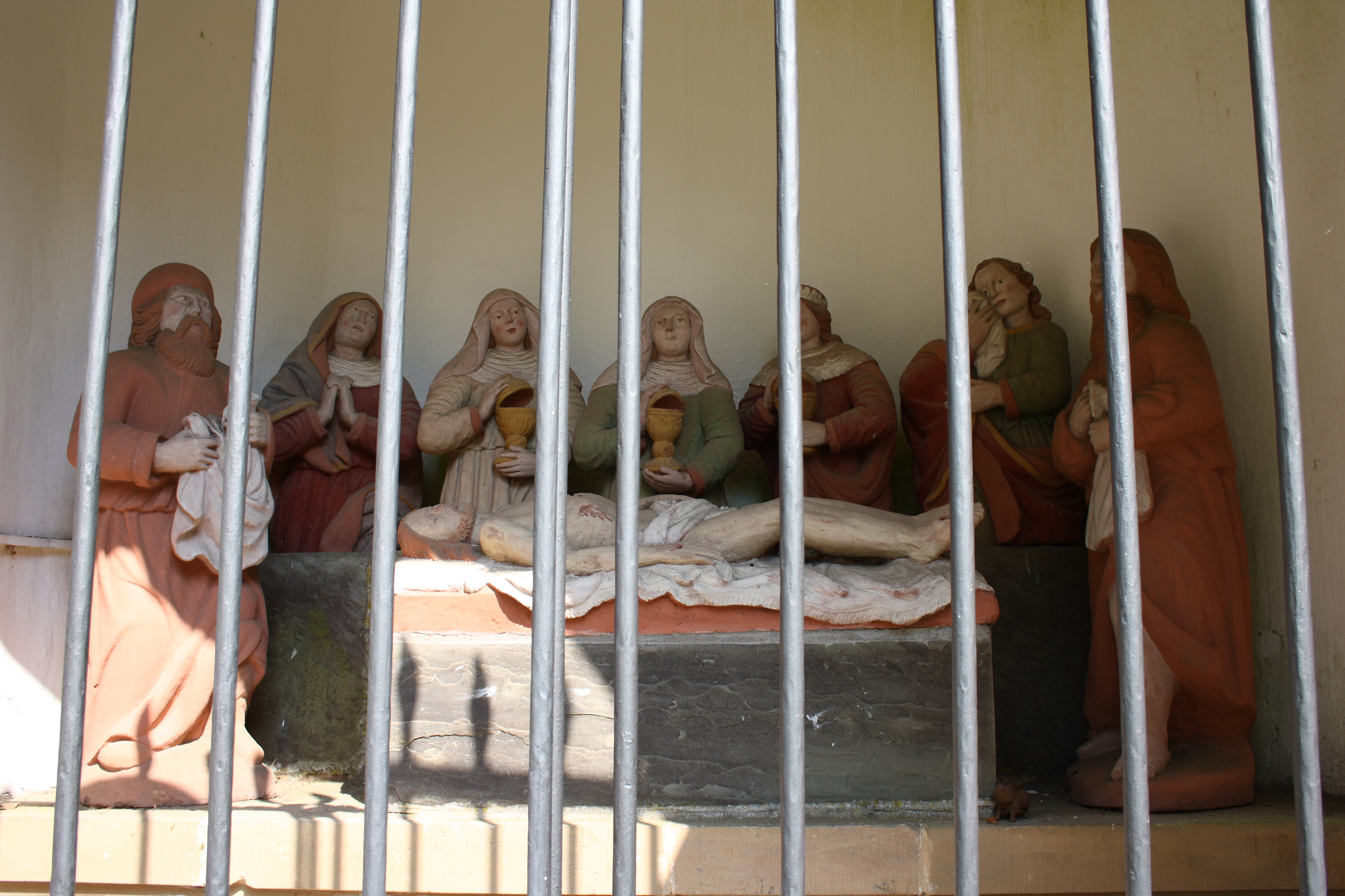 katholische Wallfahrtskapelle St. Michael auf dem Michelsberg in Bad Münstereifel im Kreis Euskirchen (Nordrhein-Westfalen)